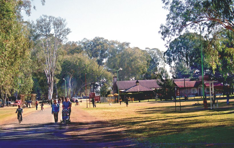 Pista de la Salud en la zona central del Parque Municipal Borchex, en Junín, Argentina. (Autor: Germán Ramos).